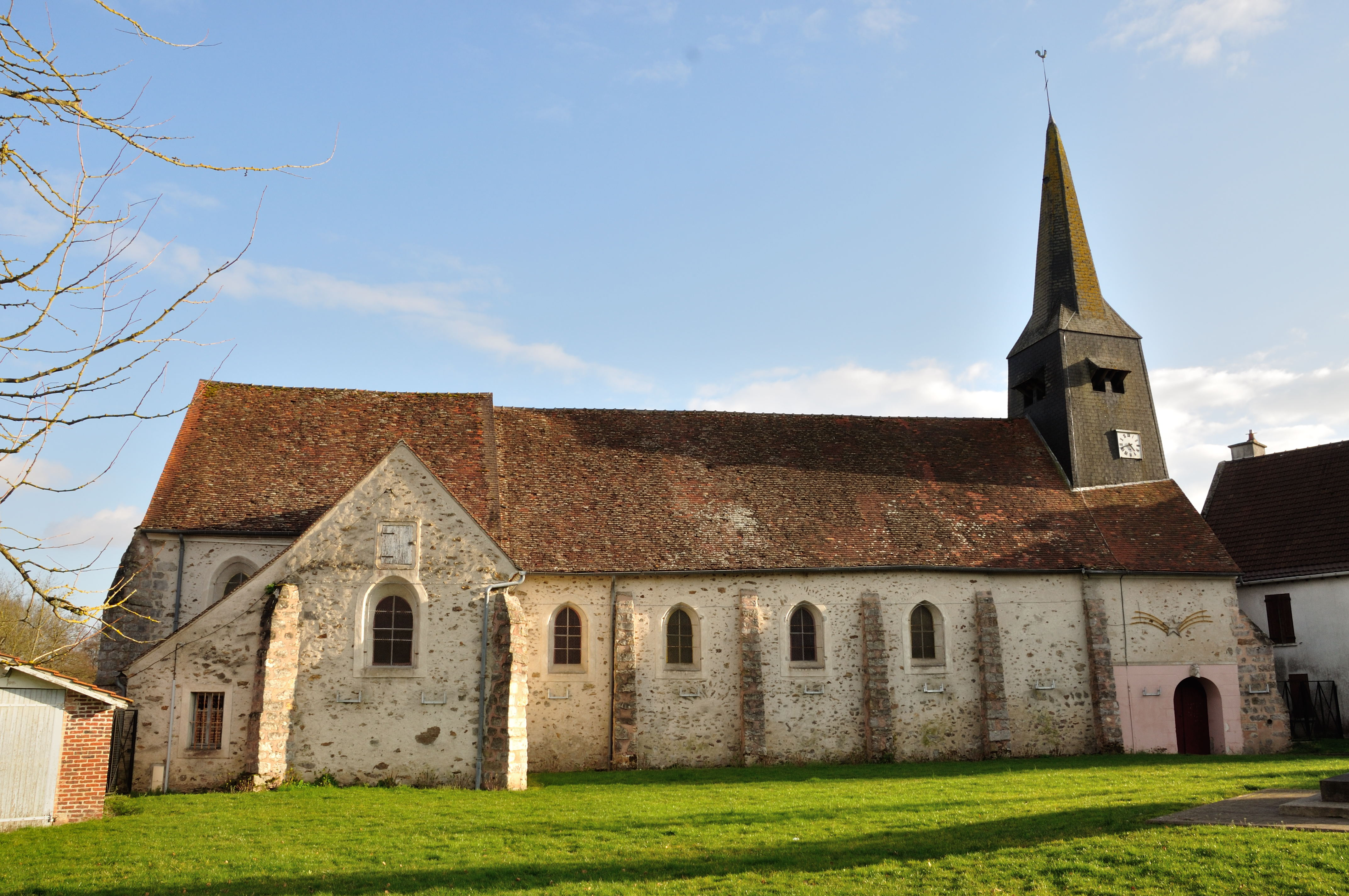 Église Saint-Germain de Saint-Germain-sous-Doue. (Seine-et-Marne, région Île-de-France).